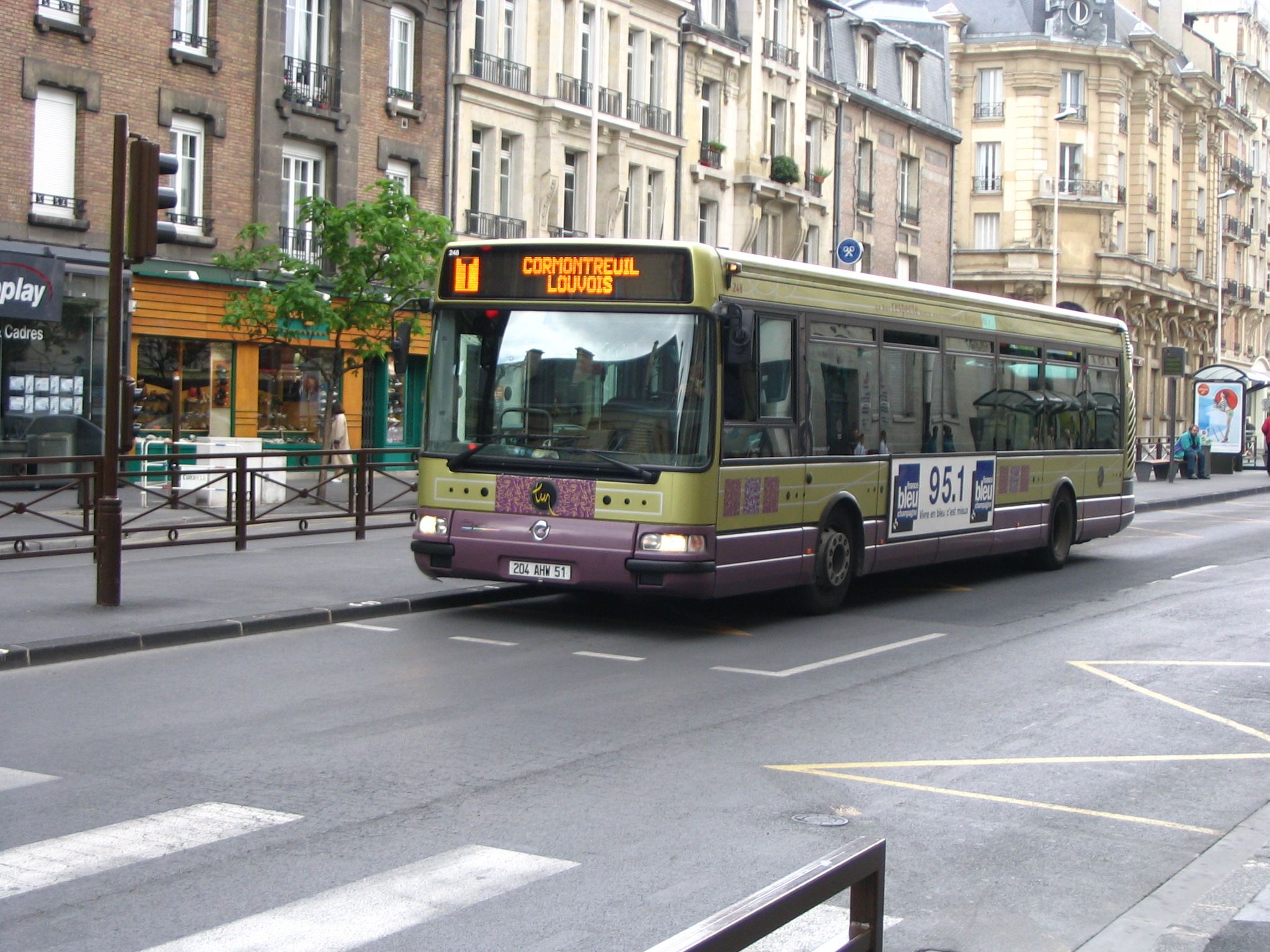 Irisbus Agora à Reims 12/05/2007.